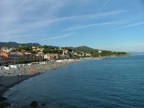 autore Fotogian, foto concessa a wikipedia